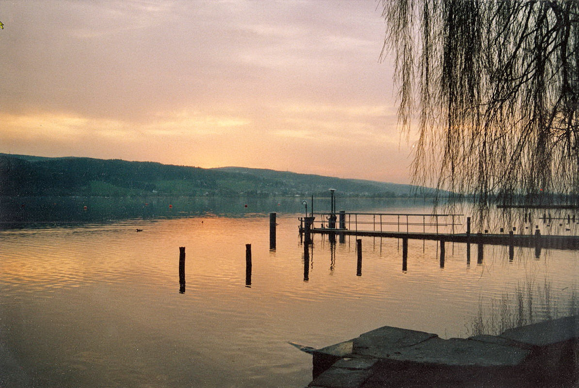 Greifensee at Greifensee (ZH) harbour seen to the west